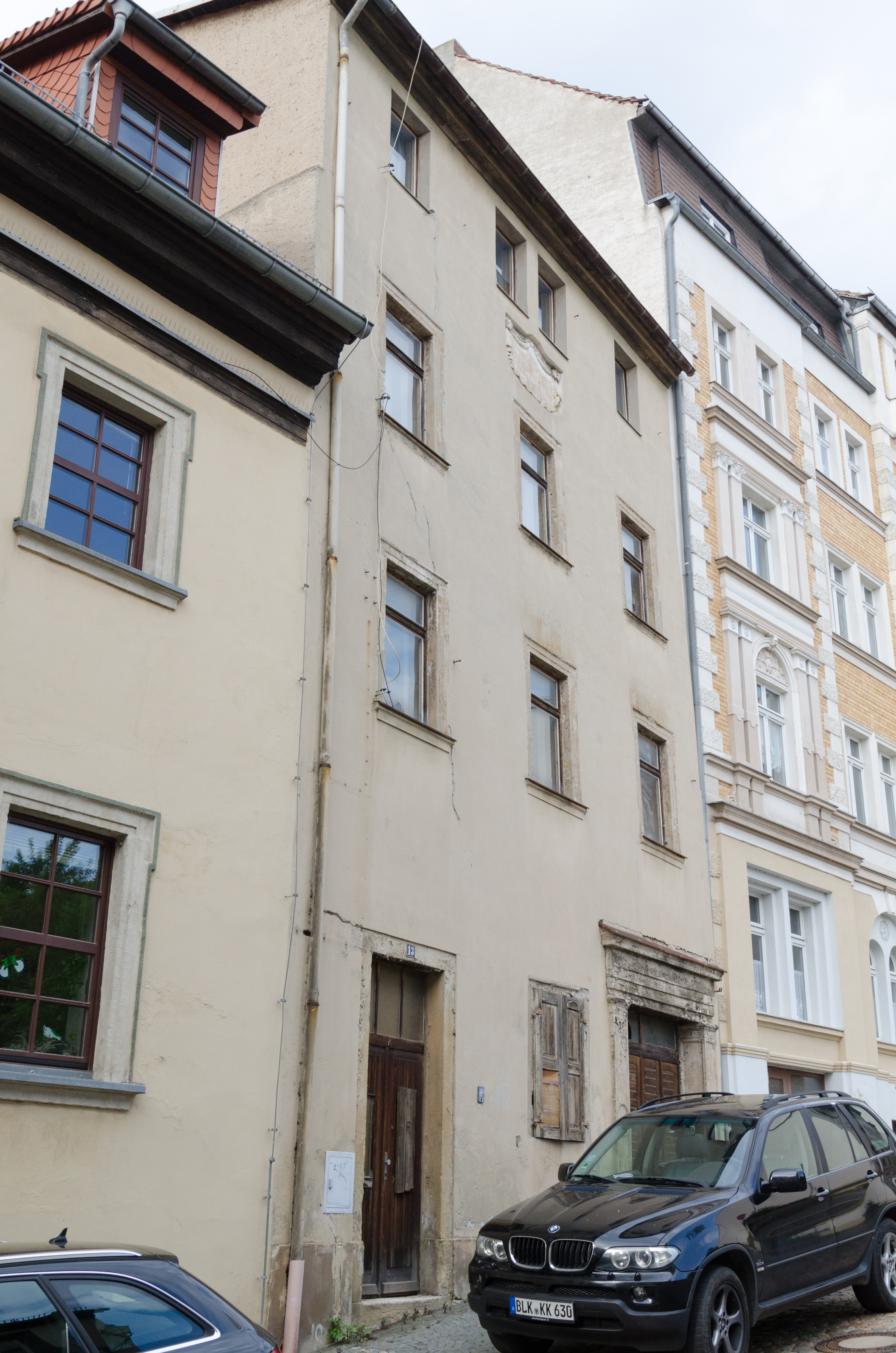 Zeitz, Messerschmiedestraße 13